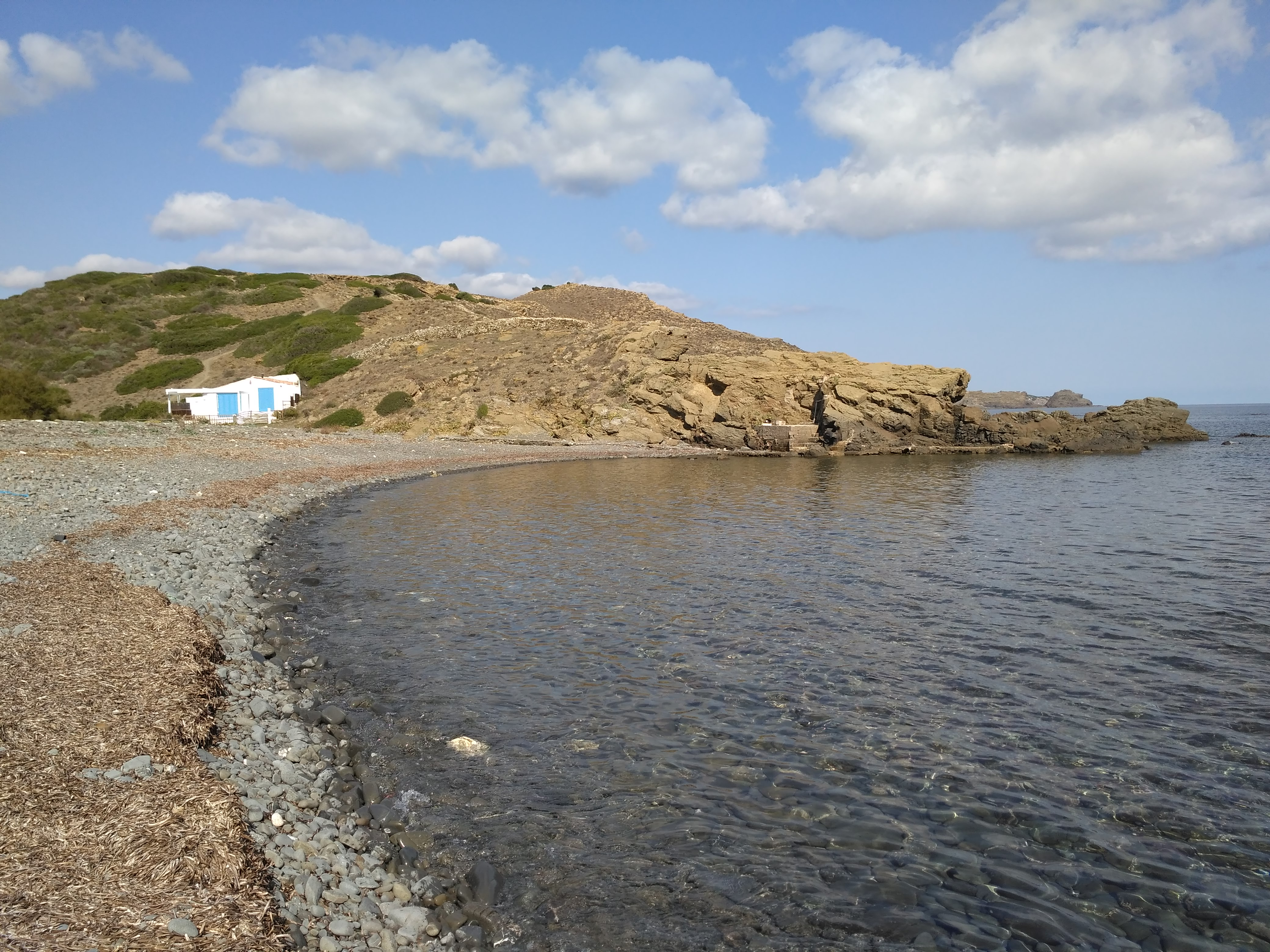 Detalle de la cala de Binillautí This is a photography of a Special Area of Conservation in Spain with the ID: ES5310072. Natura2000 entry, EEA entry